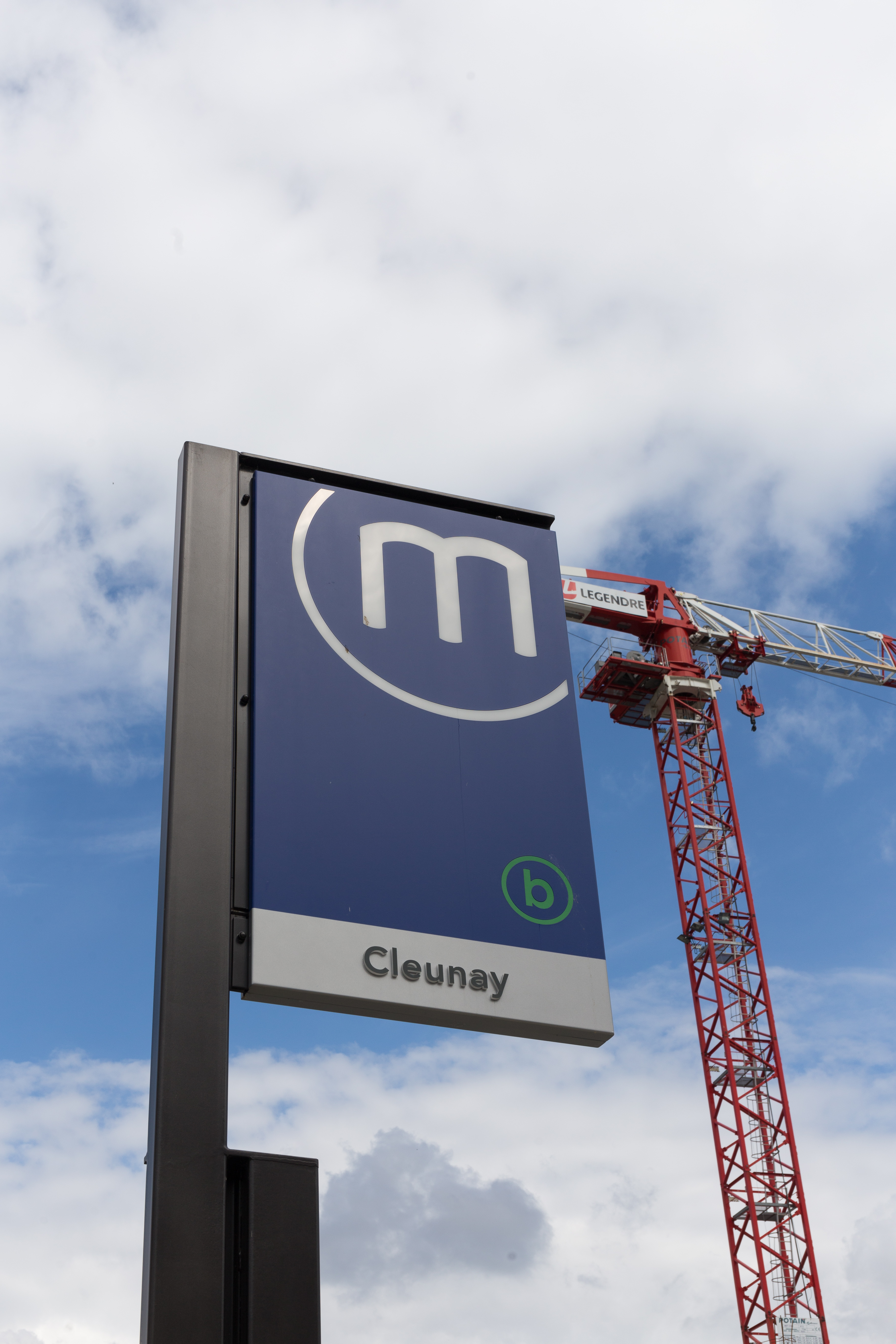 Station de métro « Cleunay » à Rennes lors de la journée portes ouvertes du chantier de la ligne b du métro de Rennes.